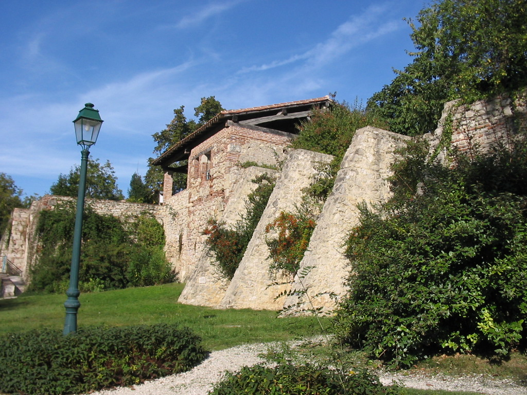 Die Überreste der Stadtbefestigung von Casseneuil am Ufer der Lède